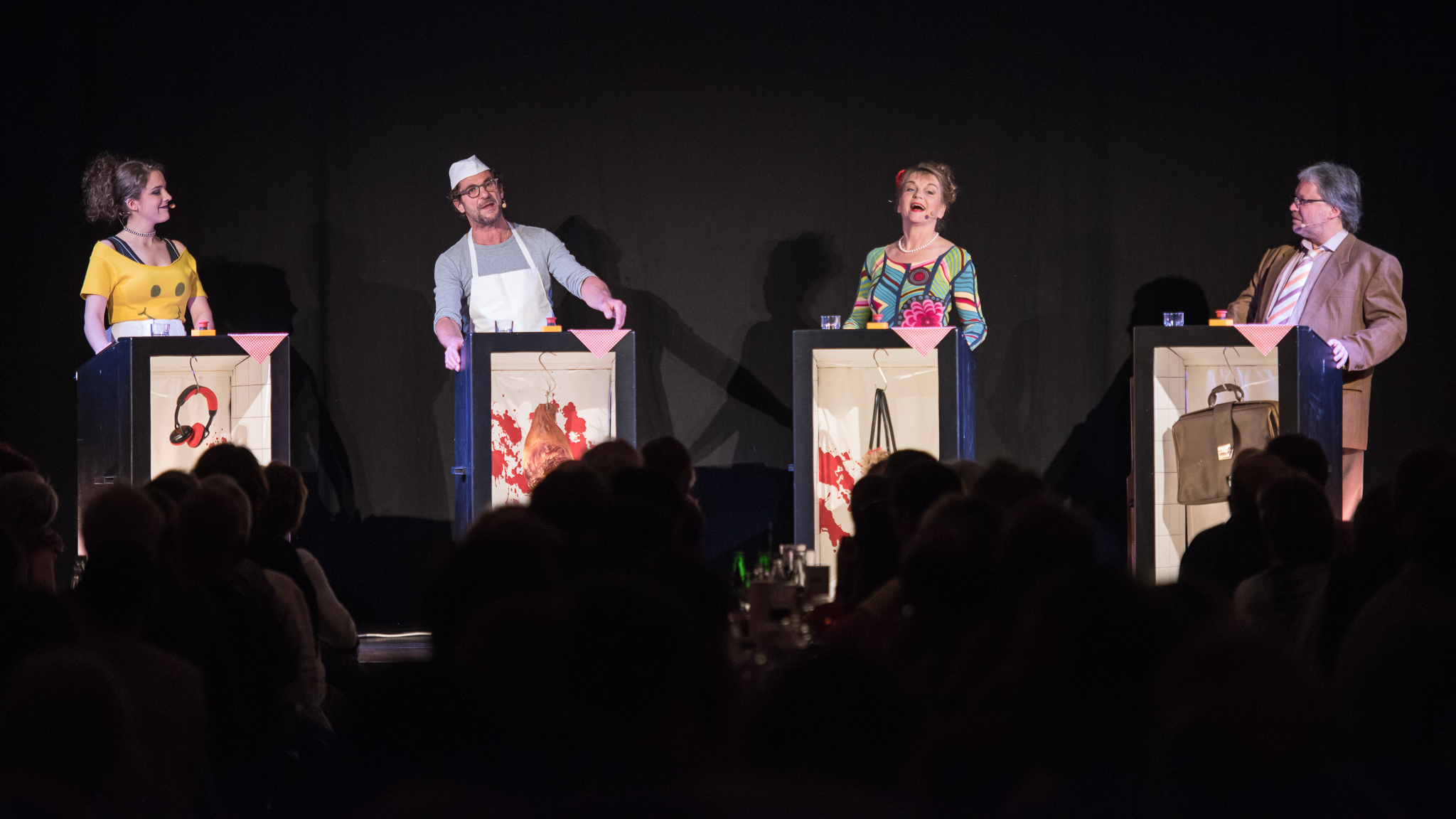 Comedy,Concertbüro Franken,Gutmann am Dutzendteich,Metzgerei Boggnsagg